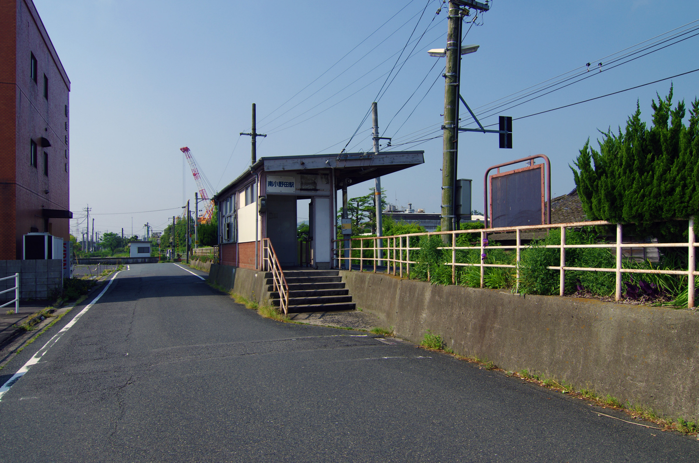 西日本旅客鉄道株式会社小野田線南小野田駅